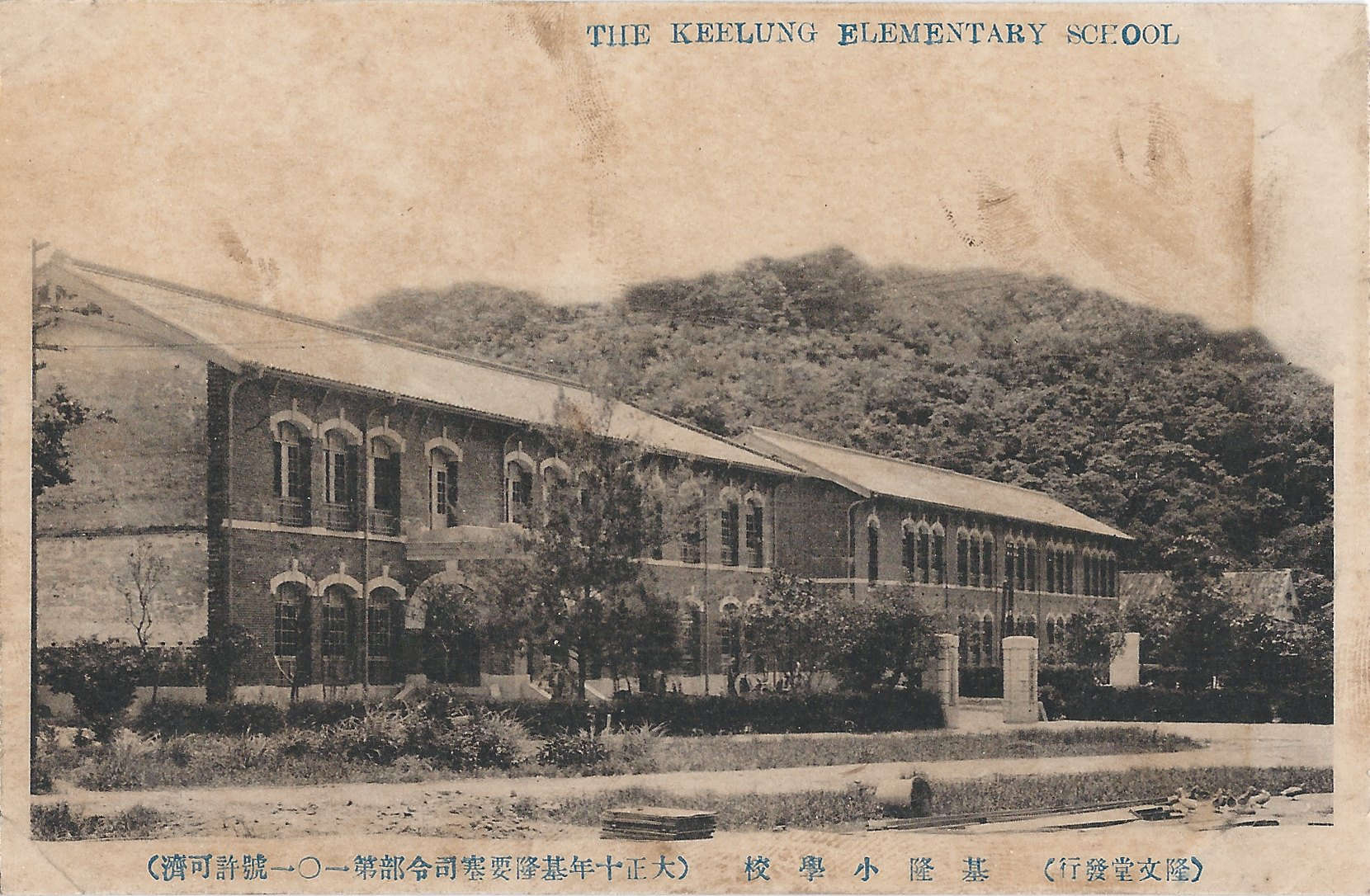 中文（台灣）: 基隆第一尋常小學校，今基隆市仁愛區仁愛國民小學